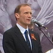 В. П. Драчёв на митинге посвящённом празднованию Дня Победы в г. Всеволожске.